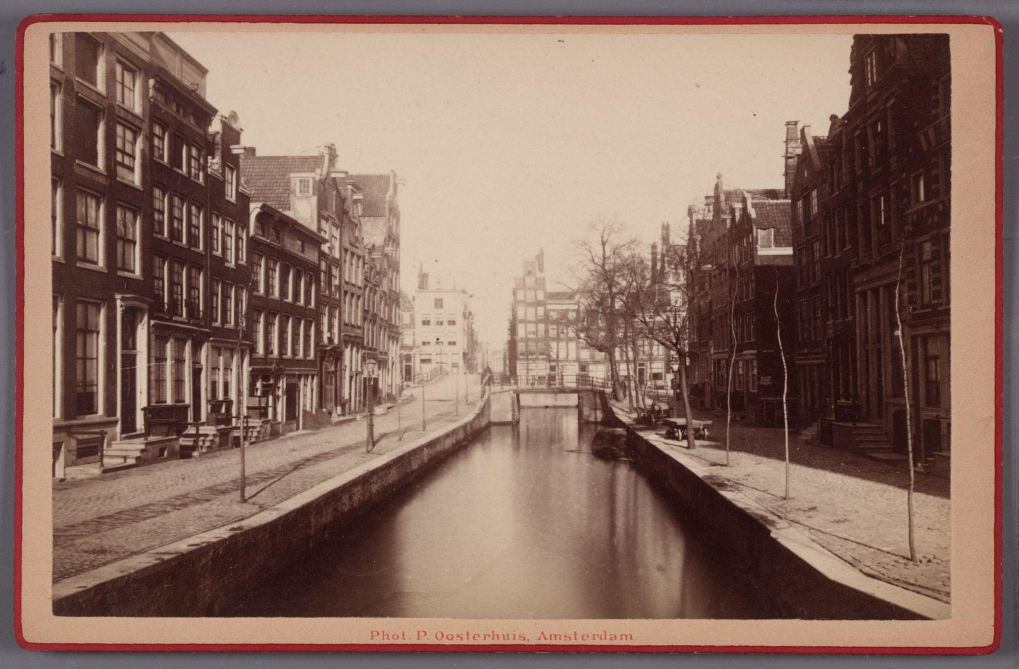 Beschrijving De Blauwburgwal gezien naar de Herengracht en de Herenstraat, in de breedte gezien brug 19 met links daarvan brug 18 (in de lengte) over de Herengracht Documenttype foto Vervaardiger Oosterhuis, Pieter Collectie Collectie Stadsarchief Amsterdam: kabinetfoto's Datering 1867 t/m 1878 Inventarissen Afbeeldingsbestand 010005001114 Generated with Dememorixer